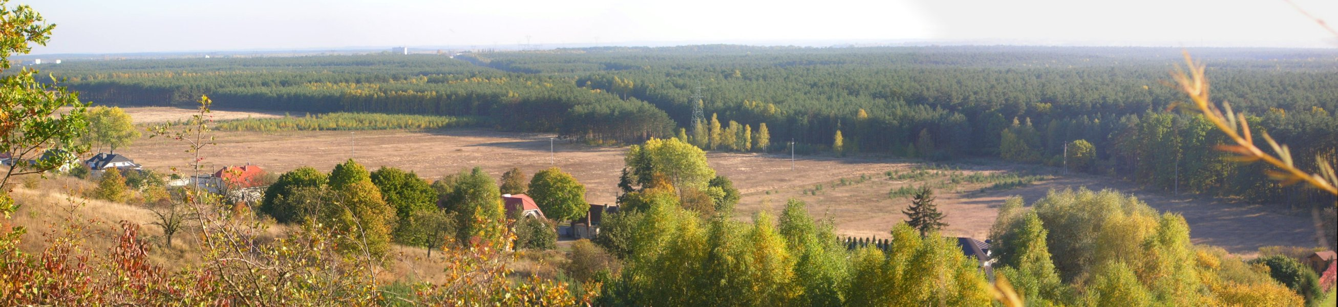 Las Gdański w Bydgoszczy widziany ze Zbocza Fordońskiego (północnej krawędzi Pradoliny Toruńsko-Eberswaldzkiej)